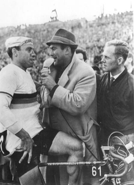 Zentralbild/Wendorf-Telefoto 3.5.1962 XV. Internationale Friedensfahrt 1962 2. Etappe Berlin-Leipzig. Einen 4. Platz belegte erneut Klaus Ampler im Leipziger Zentralstadion und rückte damit in der Gesamt-Einzelwertung auf den 2. Platz. UBz: Der DDR-Rundfunkreporter Heinz-Florian Oertel (Mitte) spricht mit Klaus Ampler kurz über den Streckenverlauf. Rechts Täve Schur [Gustav-Adolf Schur], der im Rundfunkwagen die ersten Etappen begleitet.